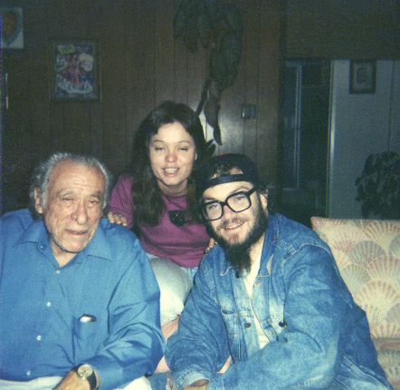 Bukowski en su casa de San Pedro en 1988, con los escritores Mary Ann Swissler y Mat Gleason.